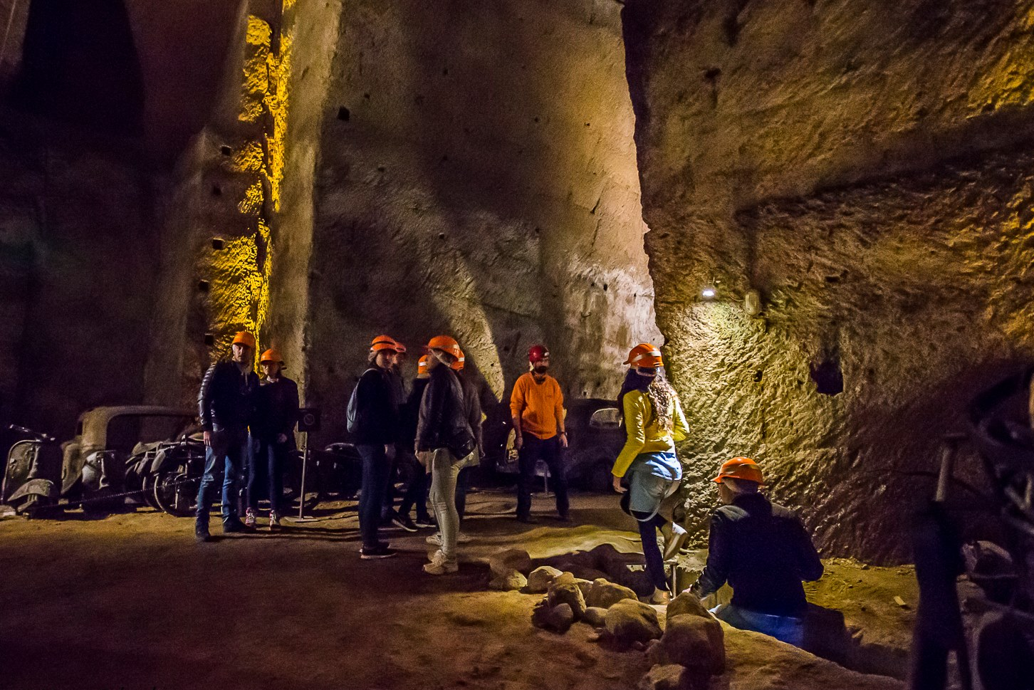 Gruppo di visitatori che esce nel deposito/rifugio. Galleria borbonica, Naples.